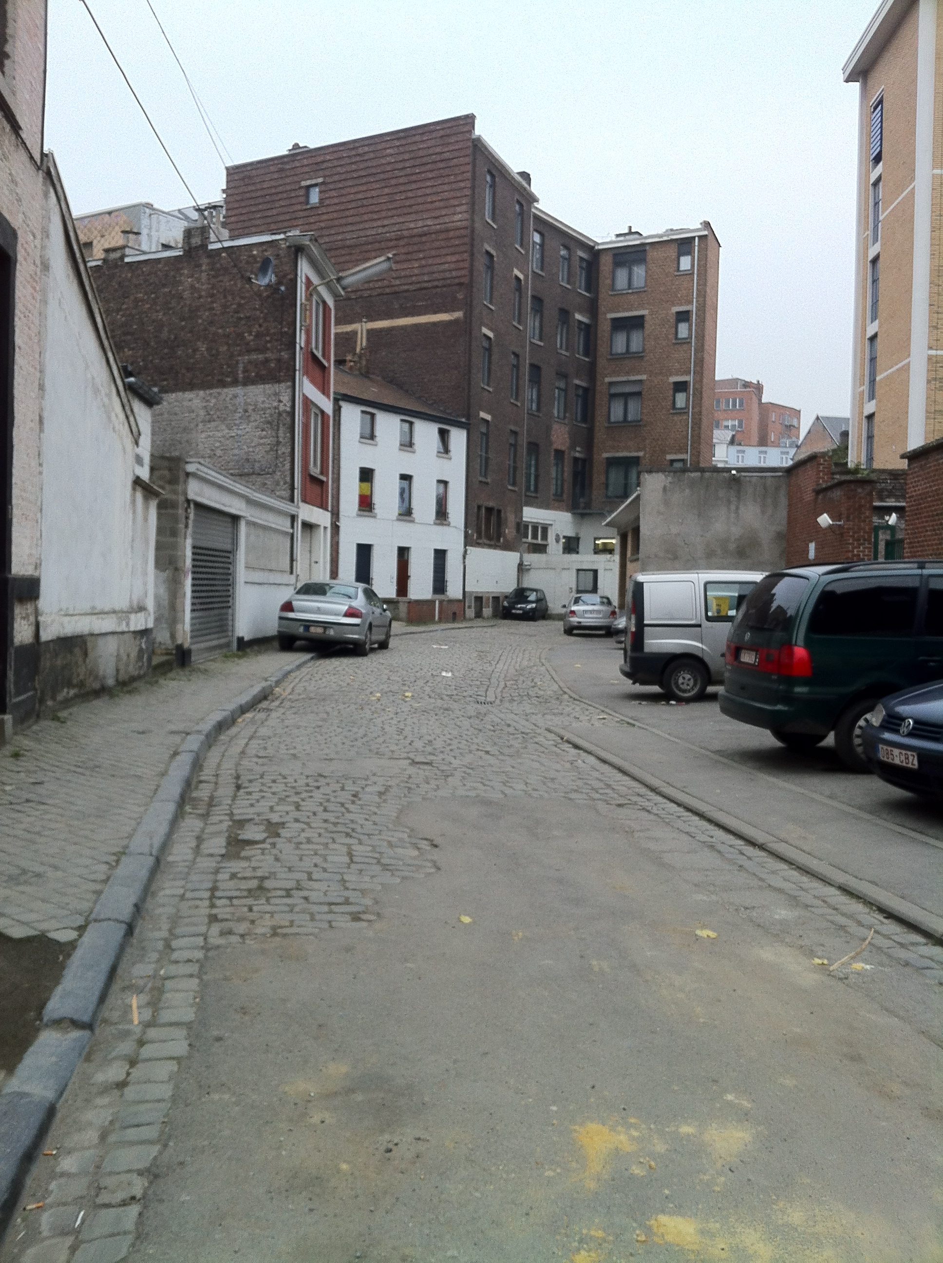 Impasse Jonckeu vue de puis la rue Paradis